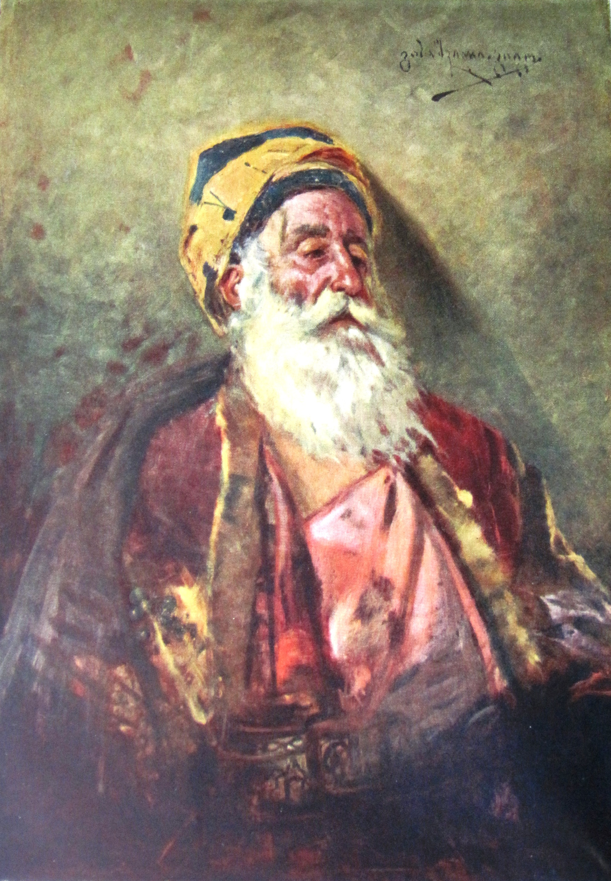 Mullah